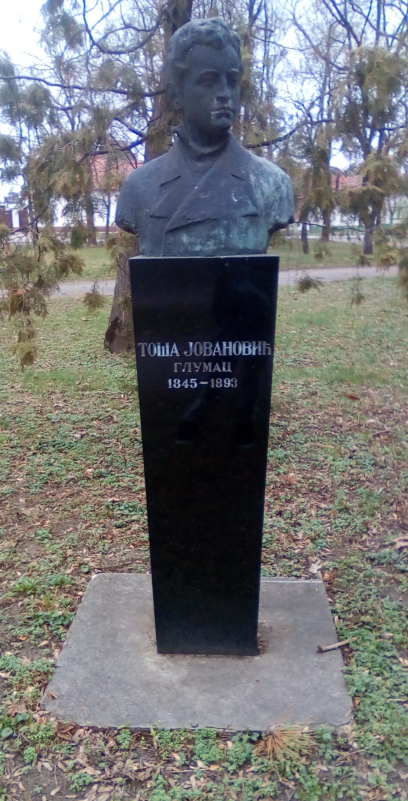 Тоша Јовановић, глумац